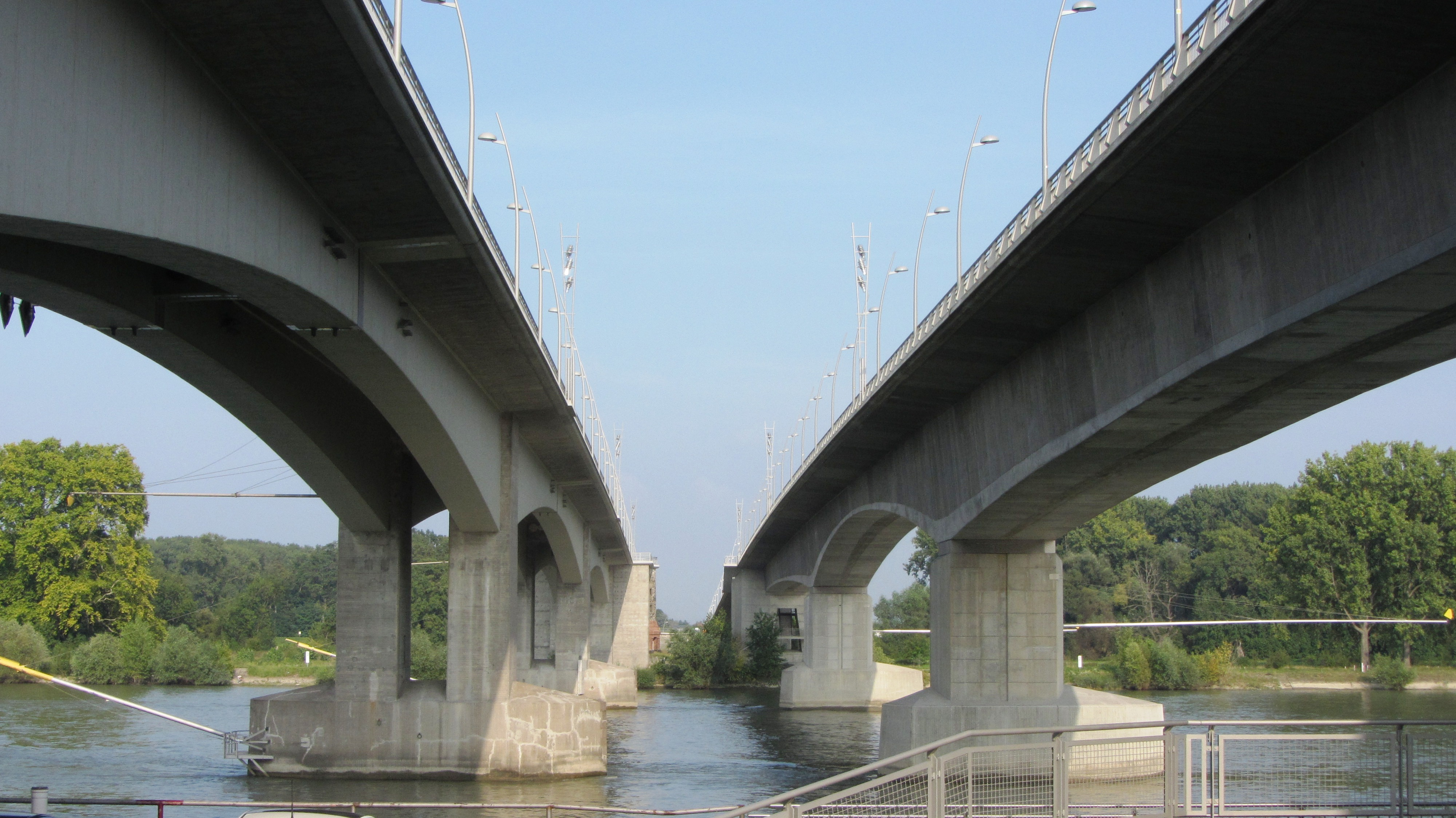 Pont des Nibelungen, traversant le Rhin près de Worms sur 4 voies